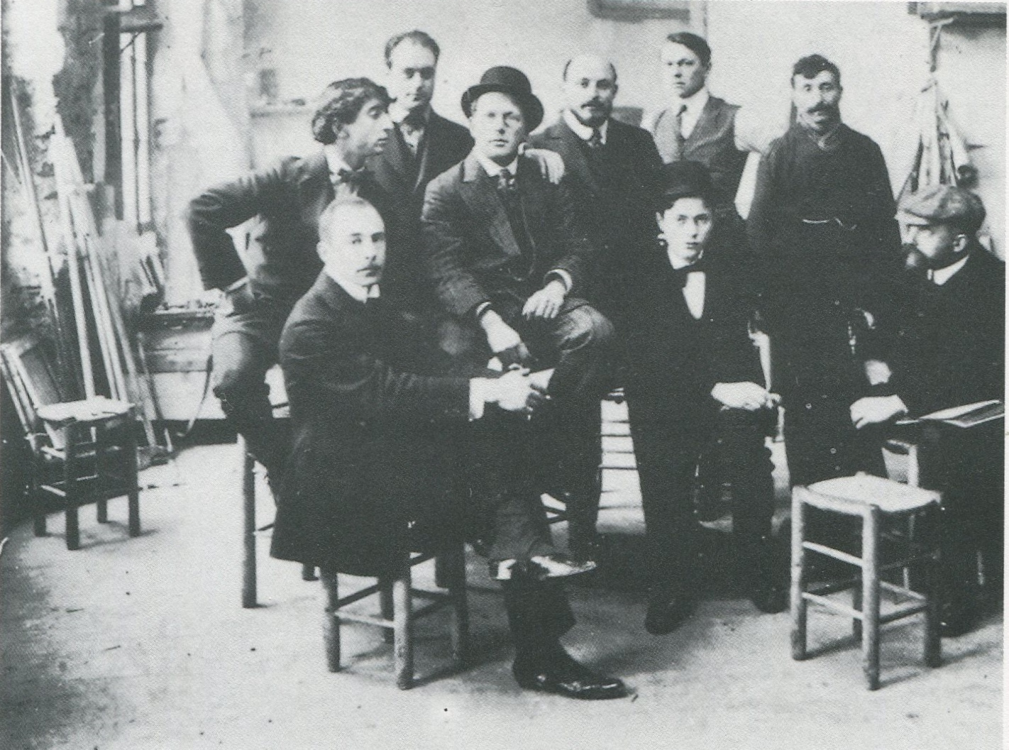 In der Académie Matisse um 1910. Ganz rechts: Wilhelm Straube. Ganz links: Walter A. Rosam. Rechts davon sitzend Franz Nölken